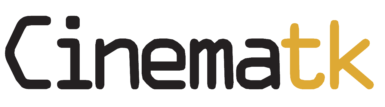 Logotipo del canal, que estuvo en vida desde 1997 hasta 2005.